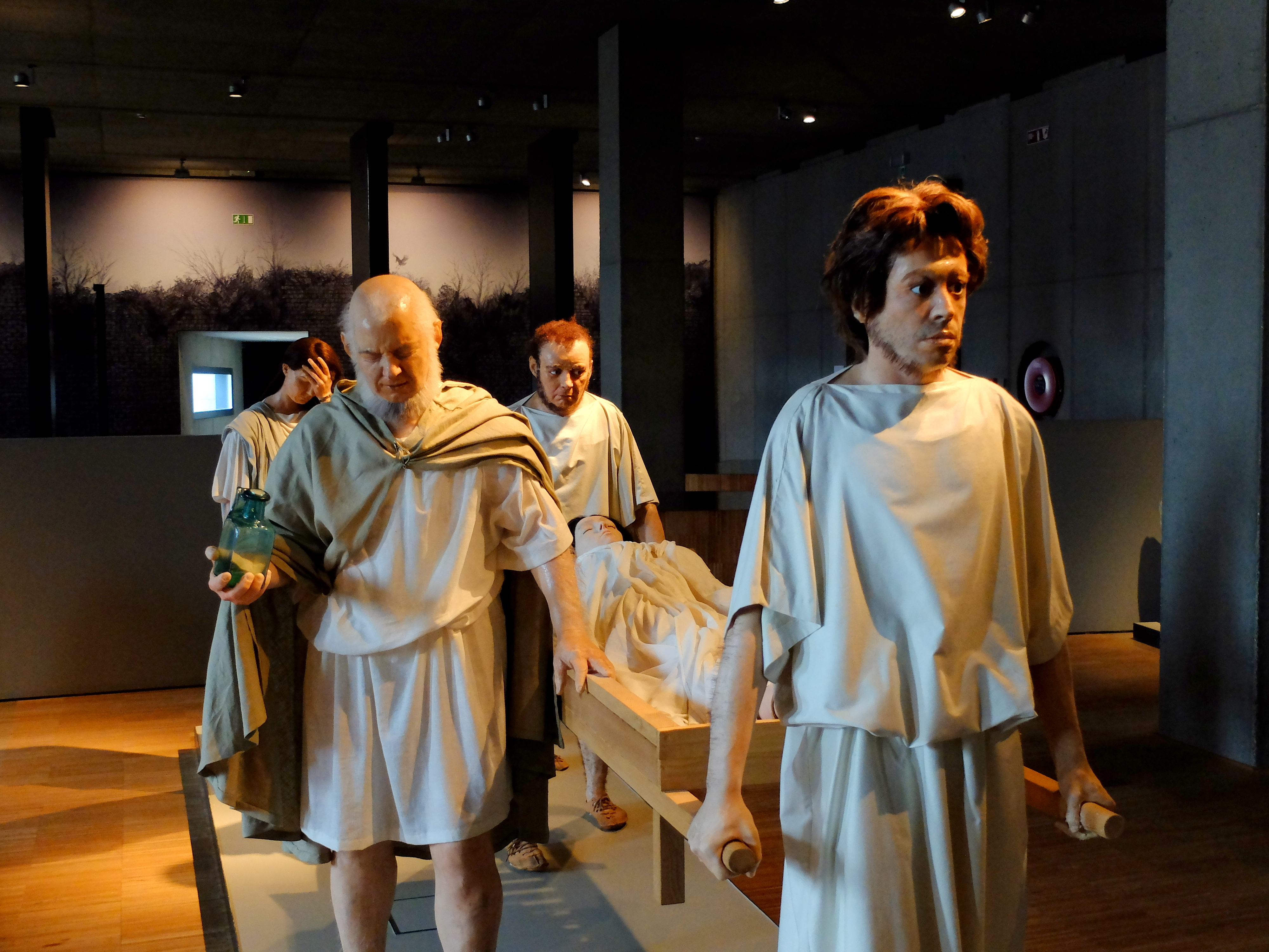 Gallisch-Römisches Museum Tongern.